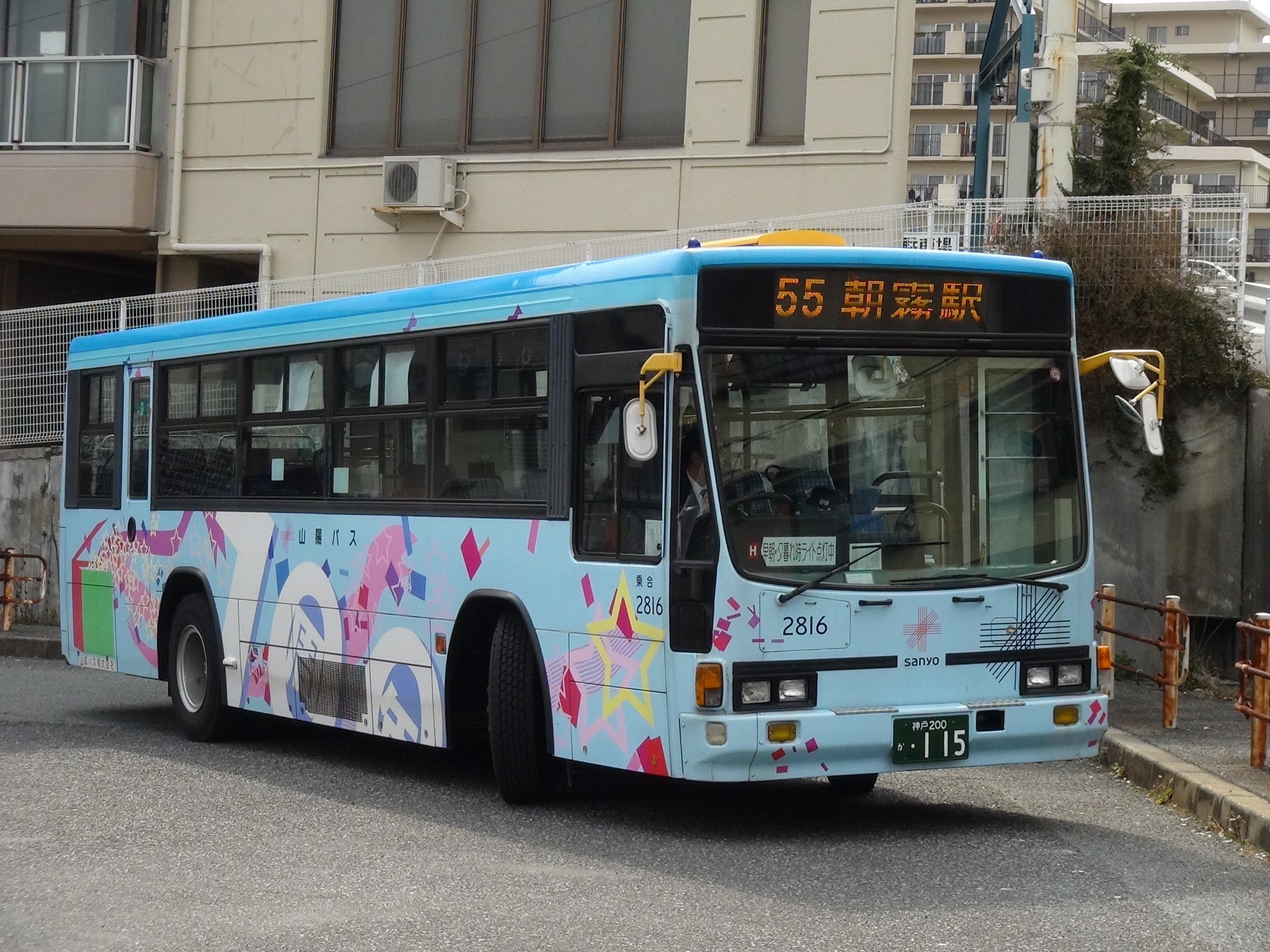 100周年記念ラッピング車